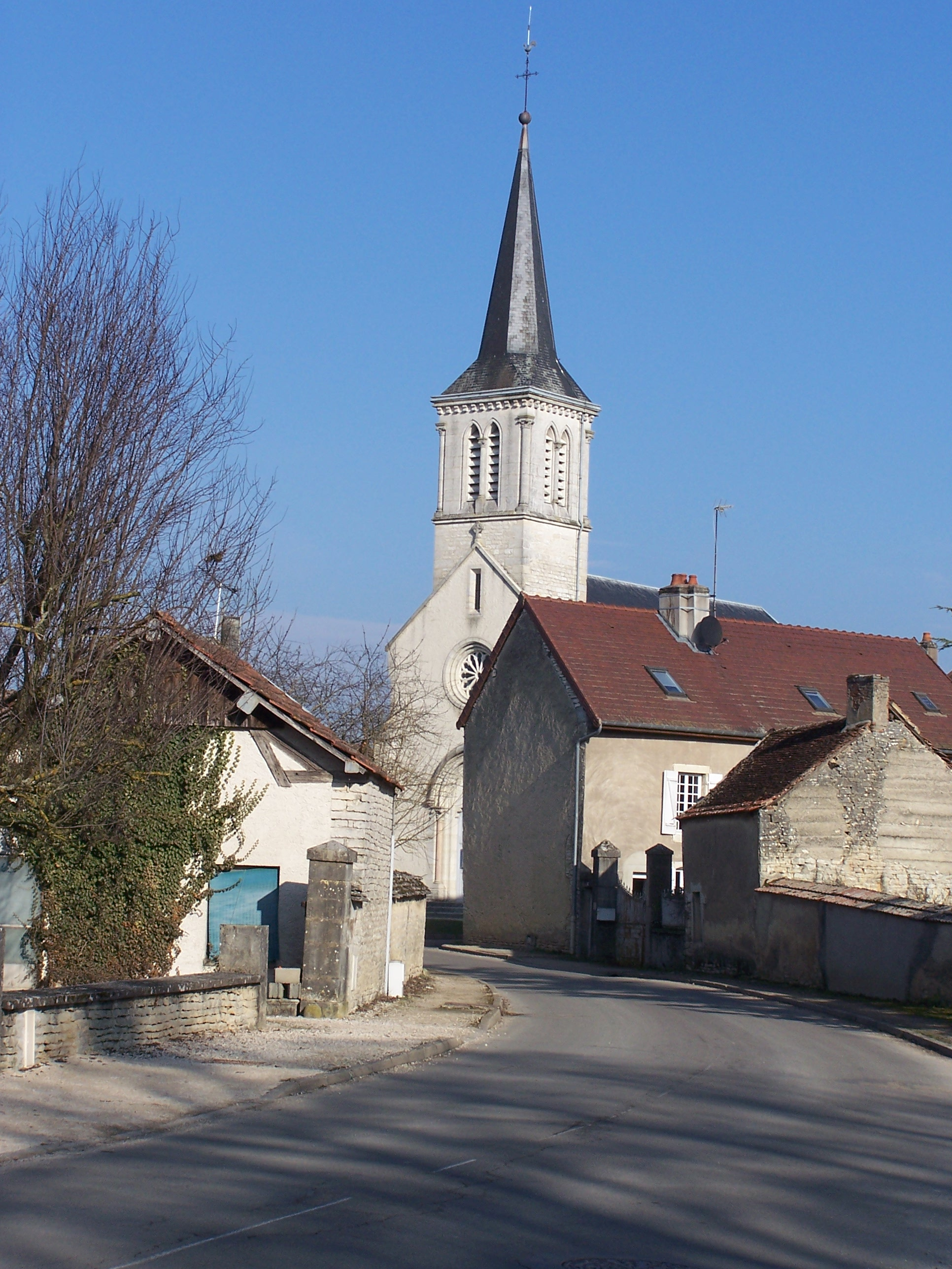 église de Clénay (VAL DE NORGES) côte d'or